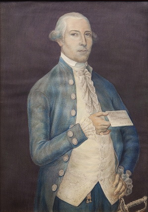 Retrato de Josep Baralt i Torres (1740–1829).